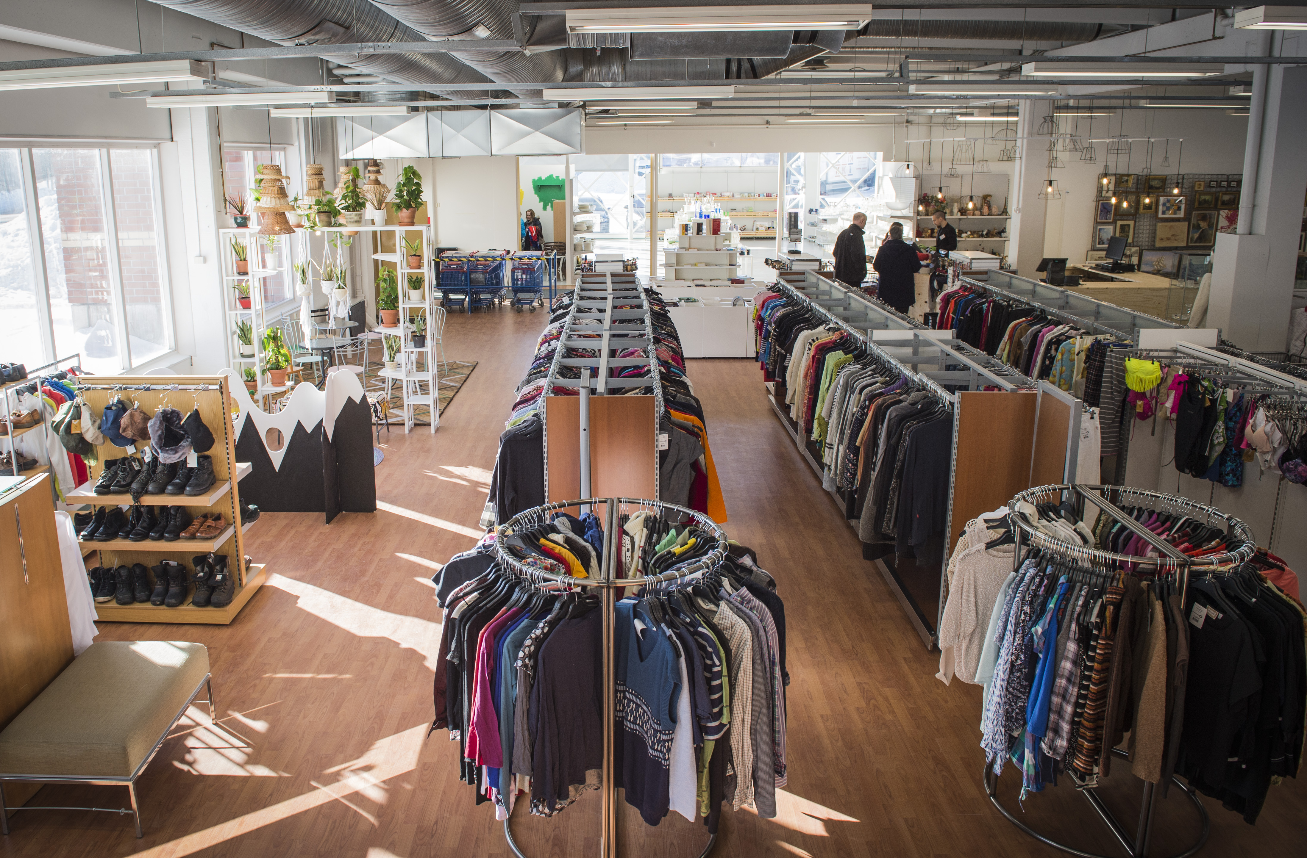 Kierrätyskeskuksen Porttipuiston myymälä Vantaalla. Kuva: Emmi Korhonen